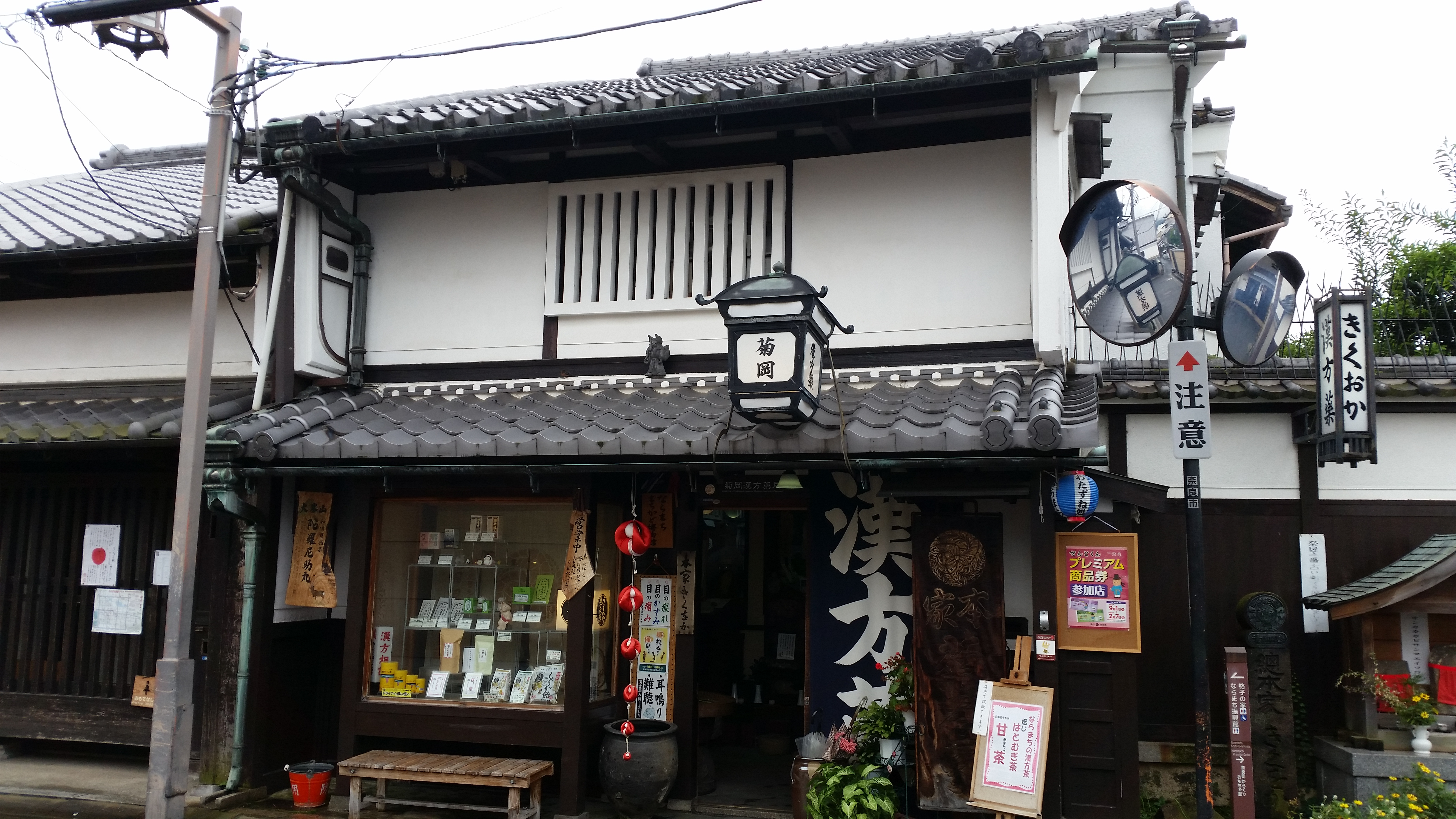 きくをか漢方薬堂、ならまち、奈良